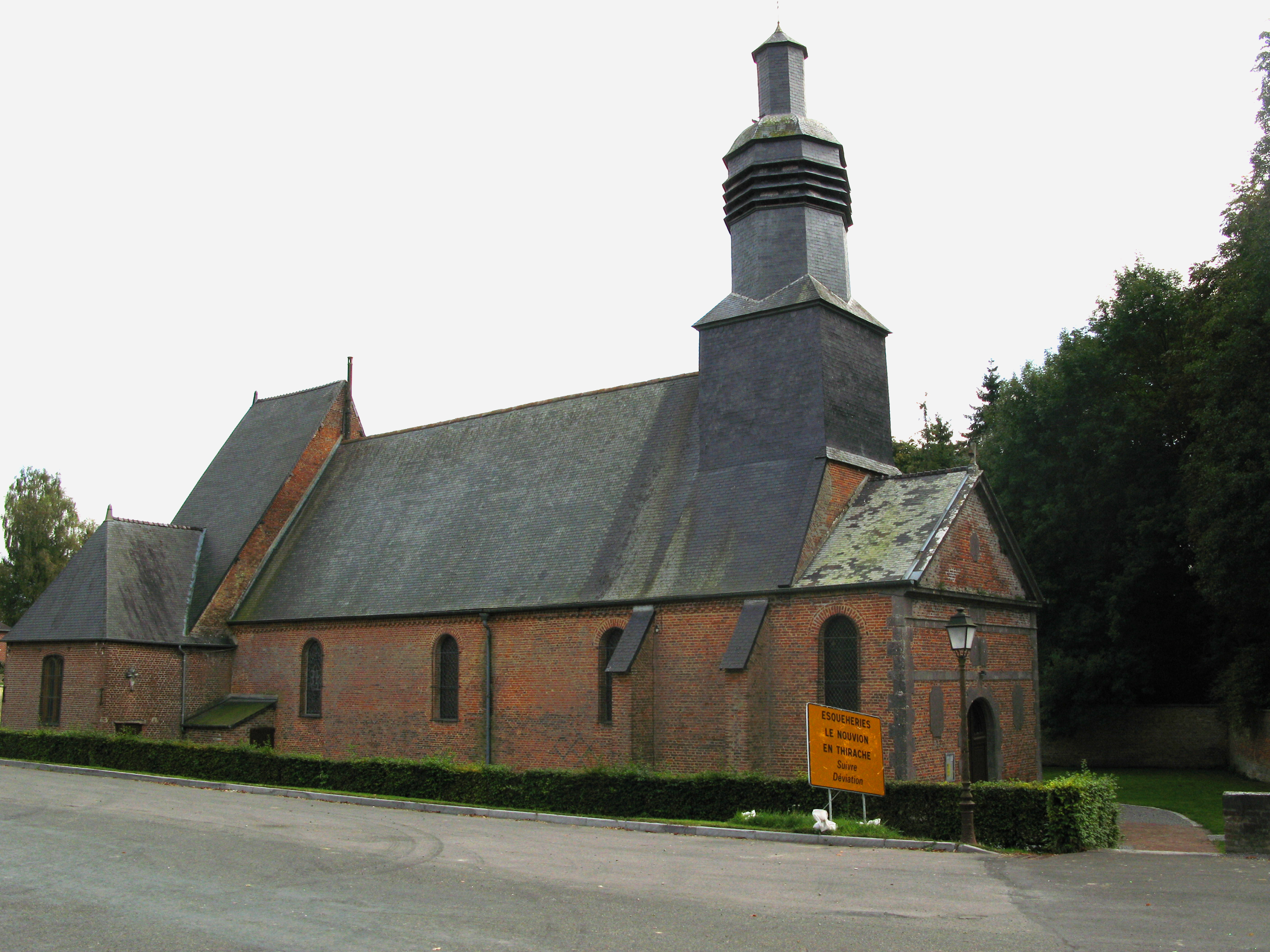 Leschelle (Aisne, France) - L'église (façade nord). On remarque, partiellement caché par la haie (entre la gouttière de descente et le pilier à sa droite), un motif décoratif en briques vitrifiées (caractéristique typique des églises fortifiées de Thiérache).